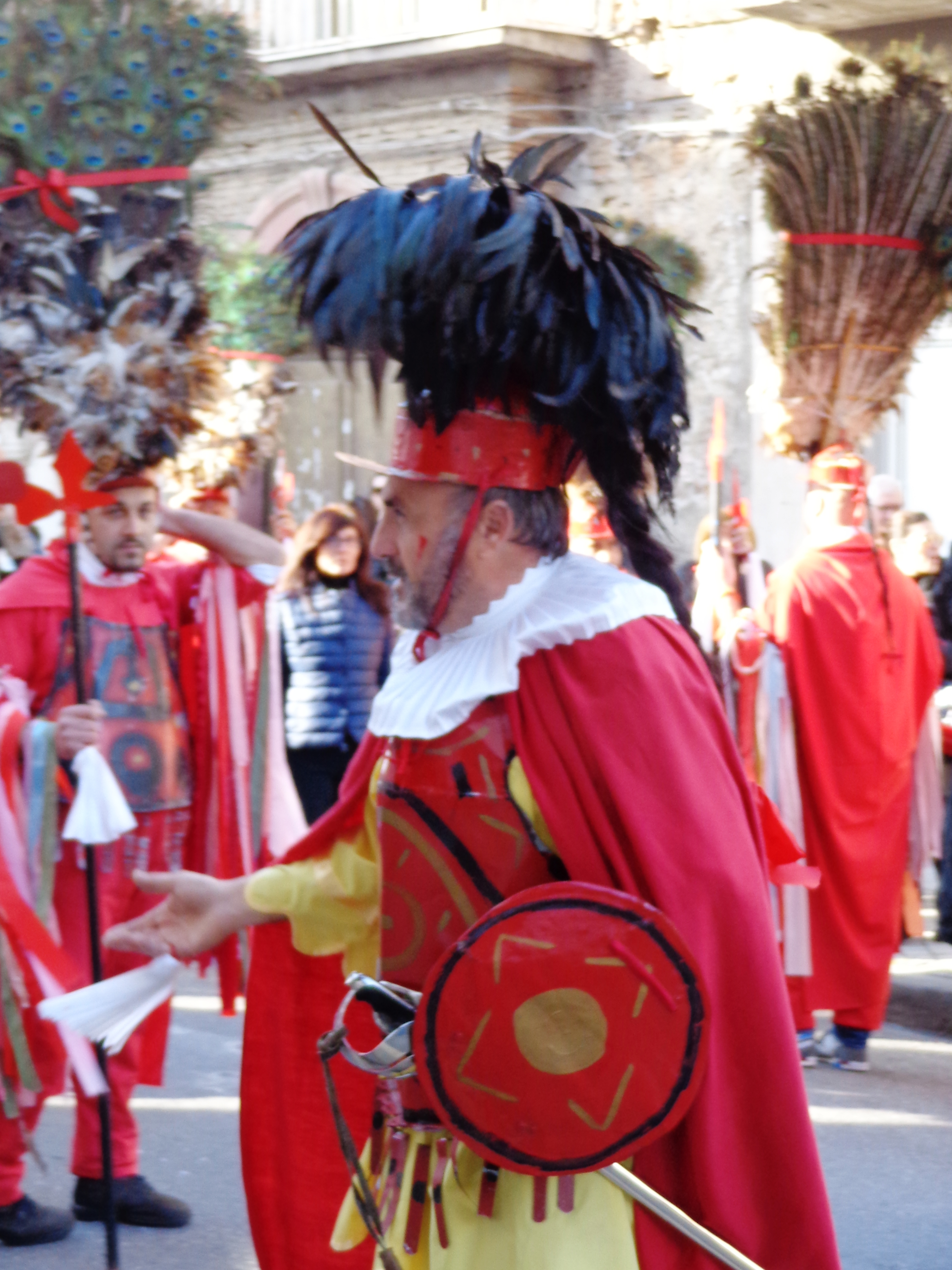 Comandante Giudei Pozzo di Gotto